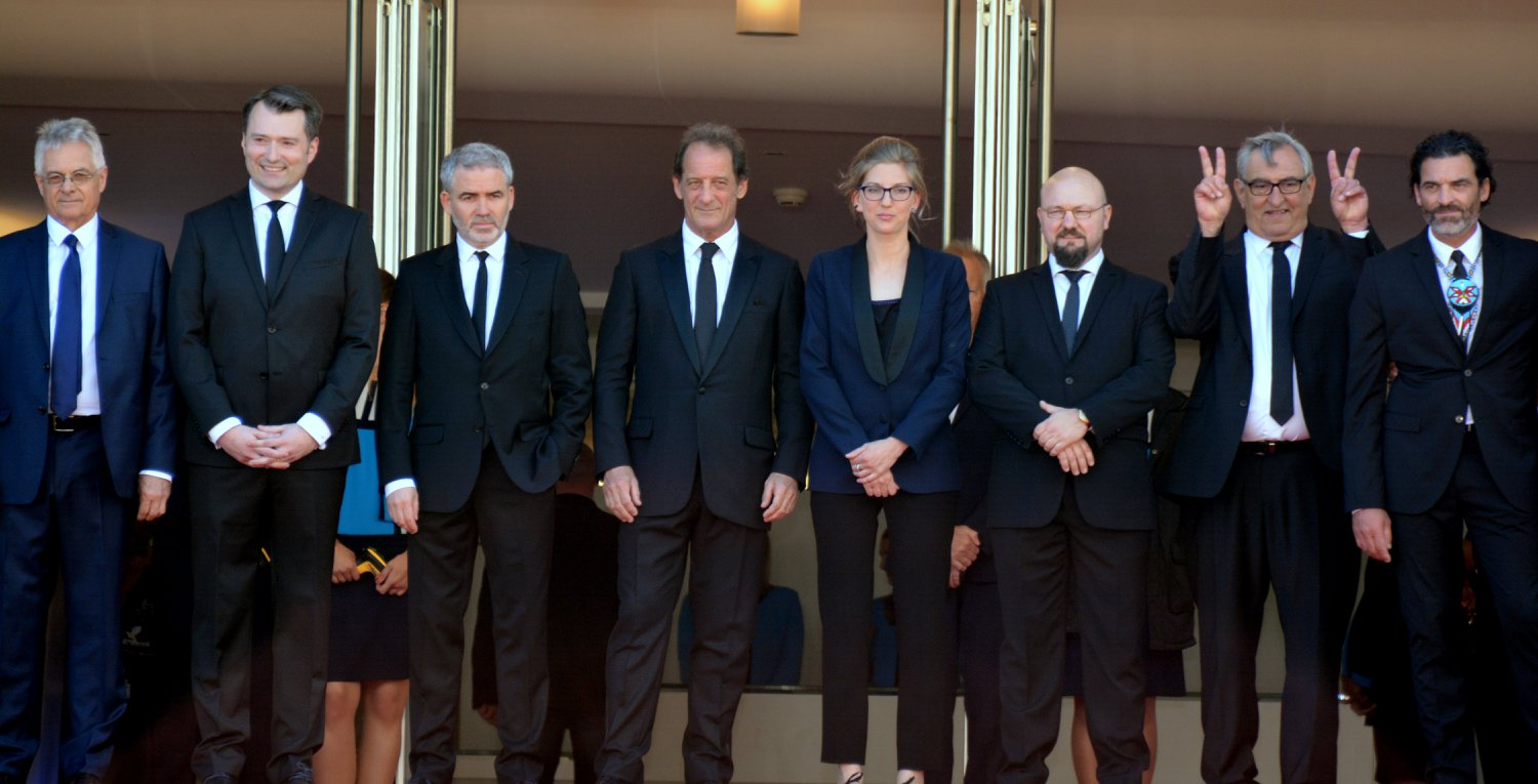 L'équipe du film En guerre au festival de Cannes.